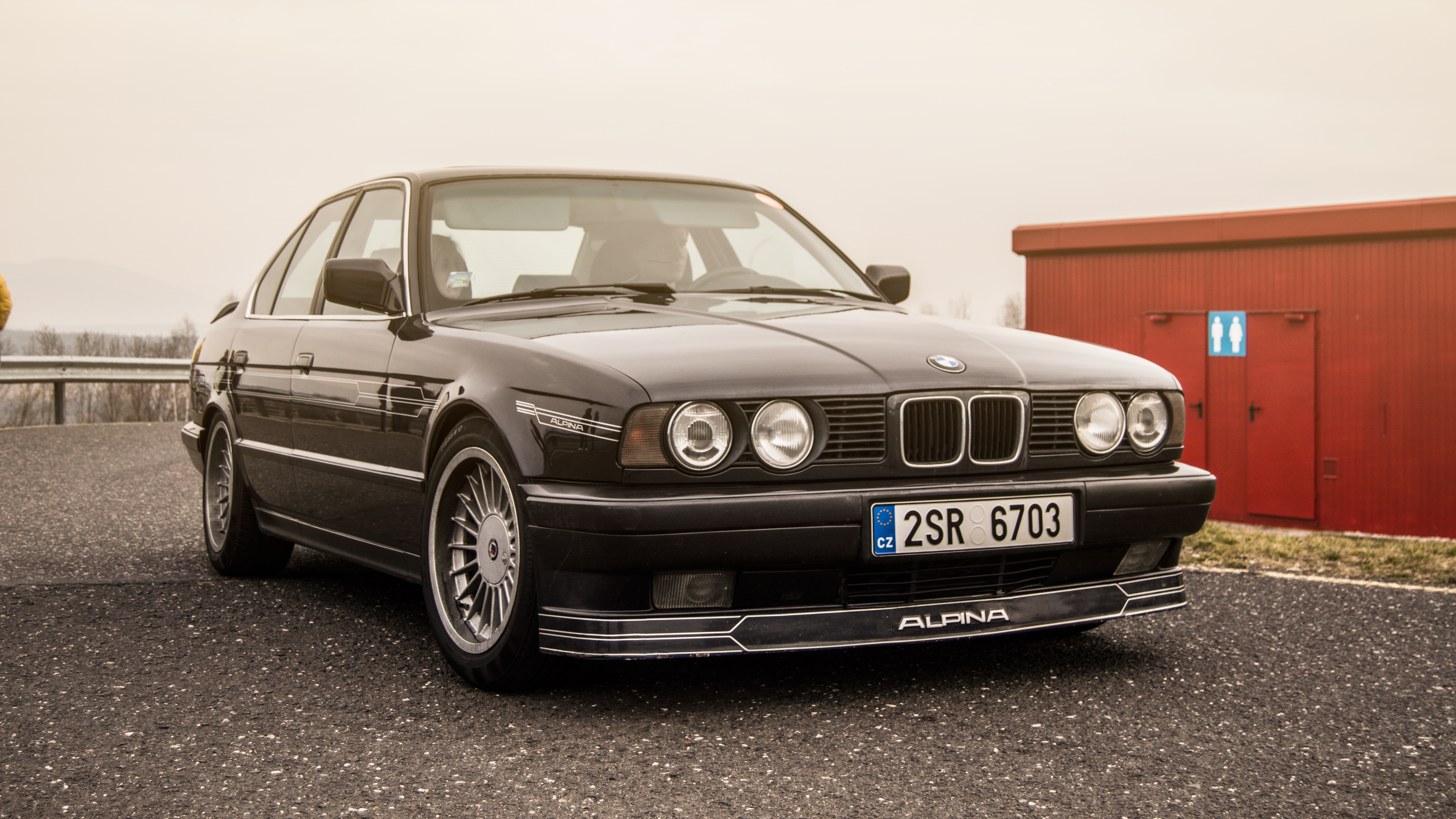 BMW E34 Alpina